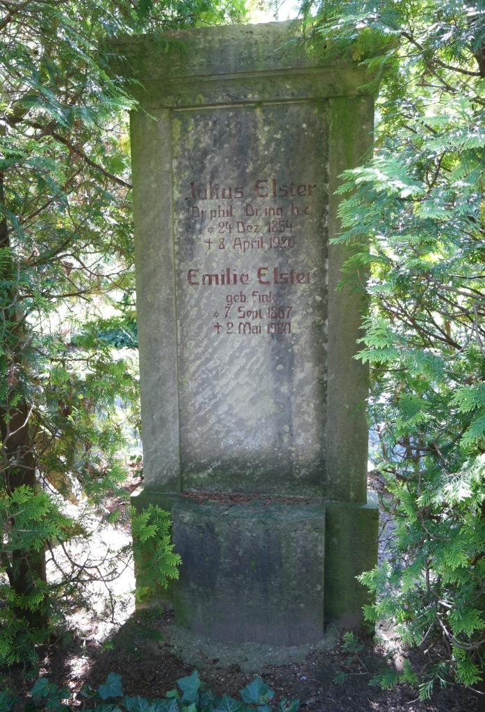 Grab des Physikers Julius Elster (1854-1920) auf dem Hauptfriedhof in Wolfenbüttel